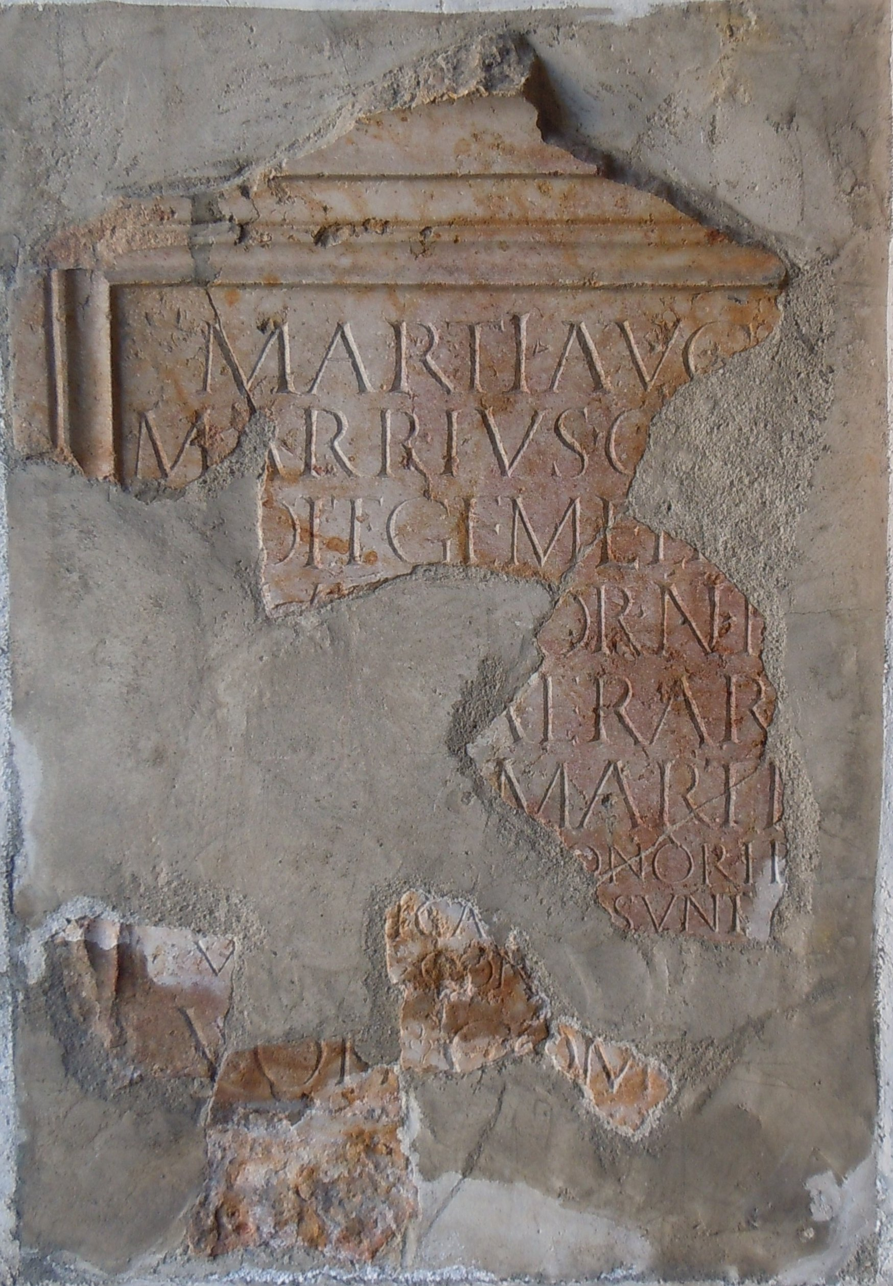 Église Saint-Pierre-et-Saint-Paul - Ec Voto adressé au dieu Mars par Marius Gemelus. Réf. AE 1934, 168 alias ILN-05-02 00549 alias CAG-74, p 287, Passy, Haute Savoie, France: Marti Aug(usto) / M(arcus) Arrius C(ai) [f(ilius)] / [V]olt(inia) Gemell[us] / [q]ua[est]or n(ummorum) p(ublicorum) / [IIvir] aerar[ii] / [flamen] Marti[s] / [omn(ibus) h]onorib[us] / [in r(ei)publica]ica[e] sunt / V[---]CON[---] / voti com[pos]